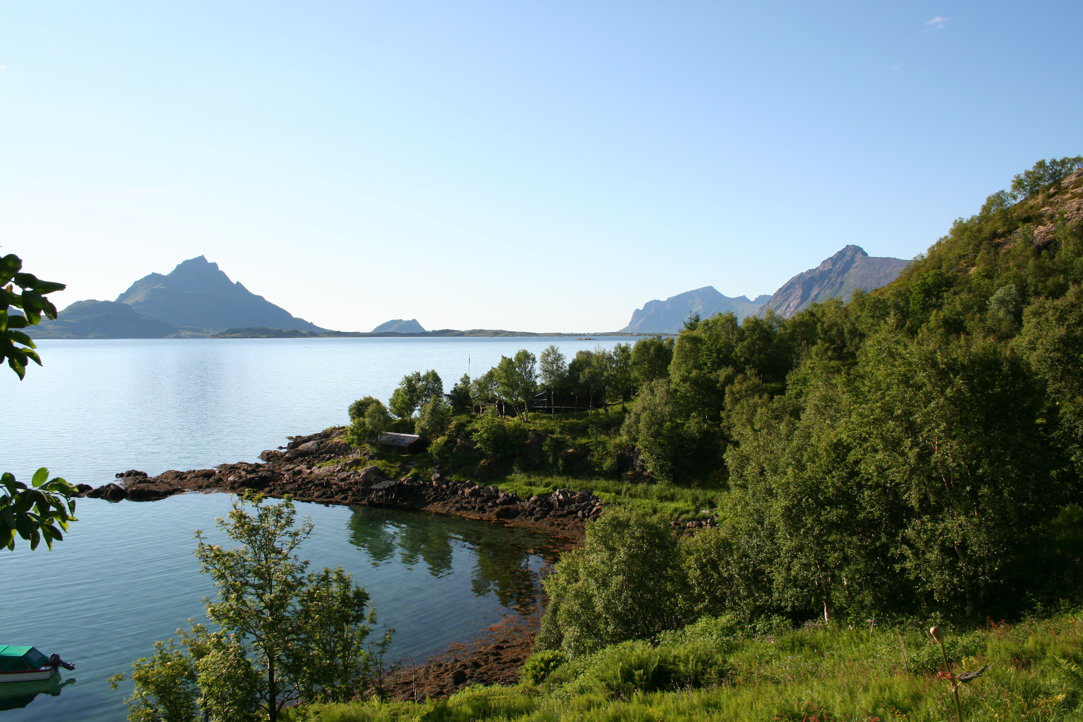 Auenfjorden in Øksnes, Norway, towards Dyrøya, Børrøya and "Little" Langøya islands